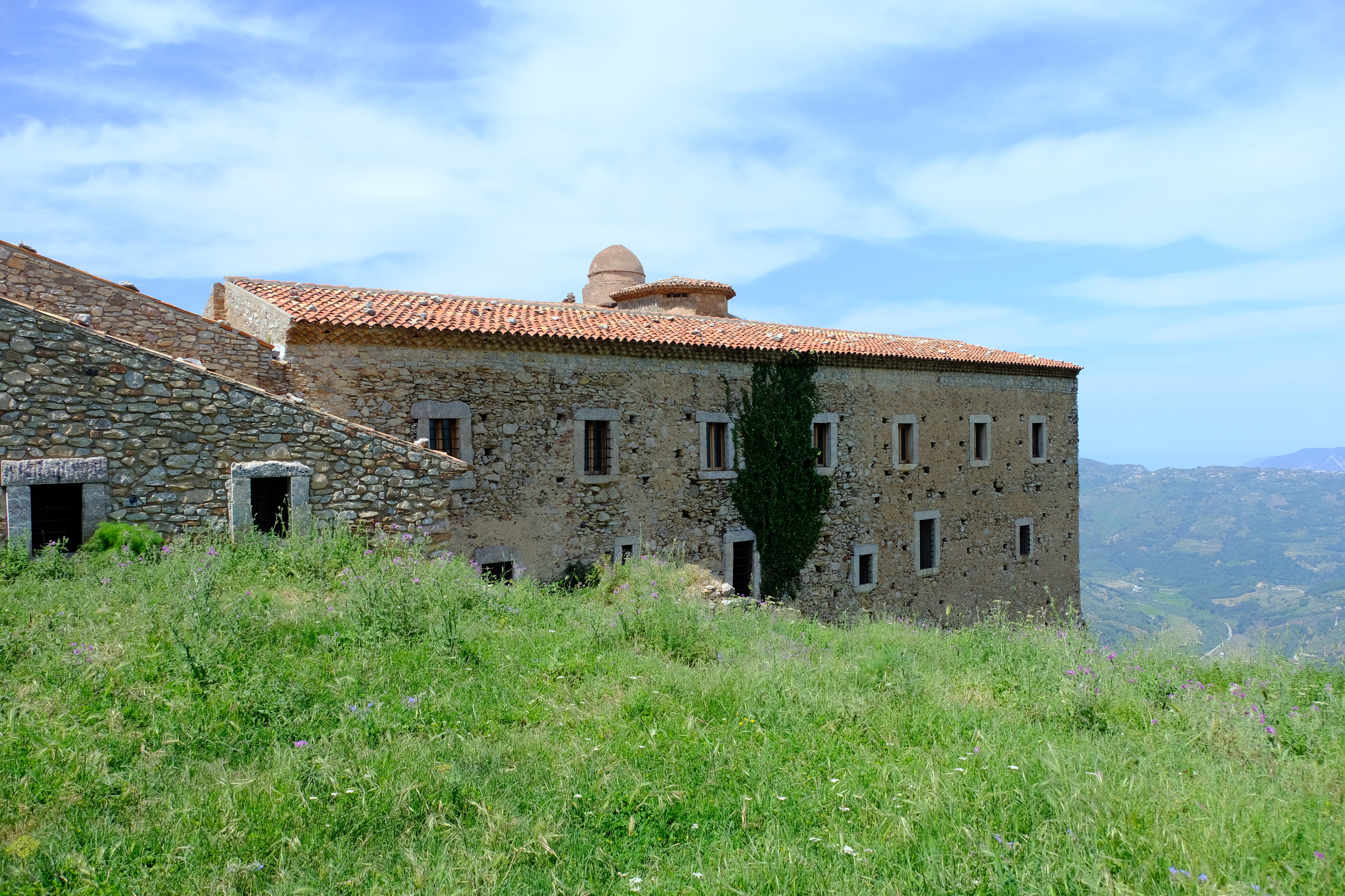 Convento di San Filippo di Fragalà